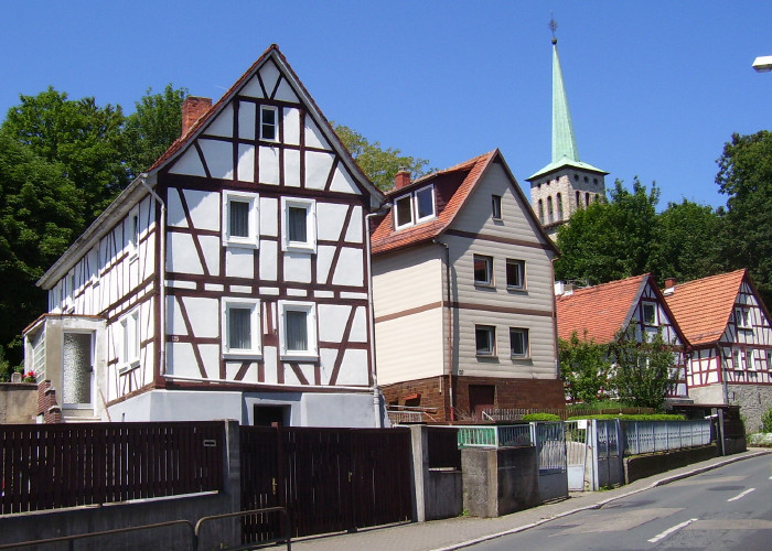 St. Mary's church in the borrough of Seckbach in Frankfurt, Hesse, Germany Marienkirche in Frankfurt am Main-Seckbach, Hessen, Deutschland